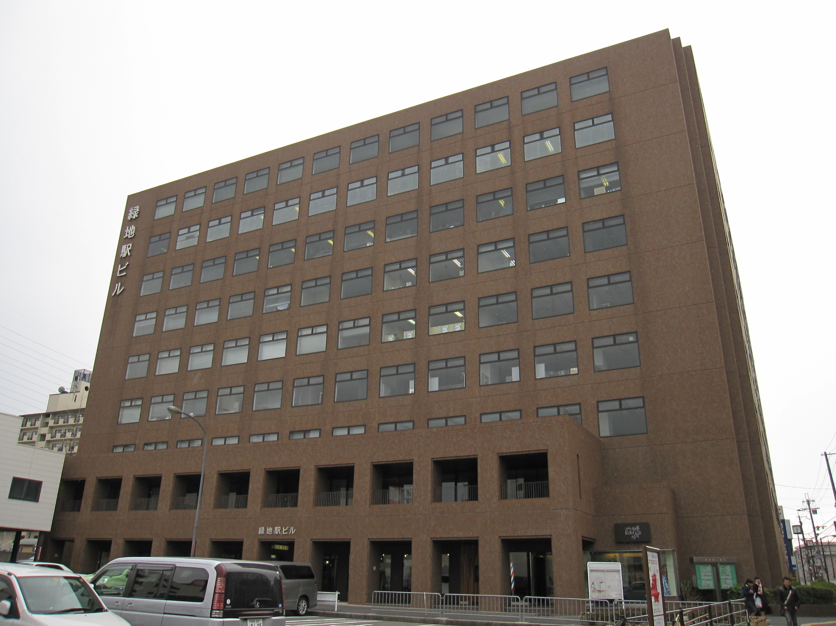 北大阪急行本社